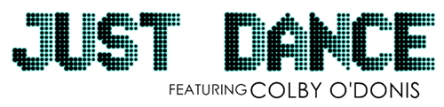 Logo de "Just Dance", creado por User:El Javo y subido por mí